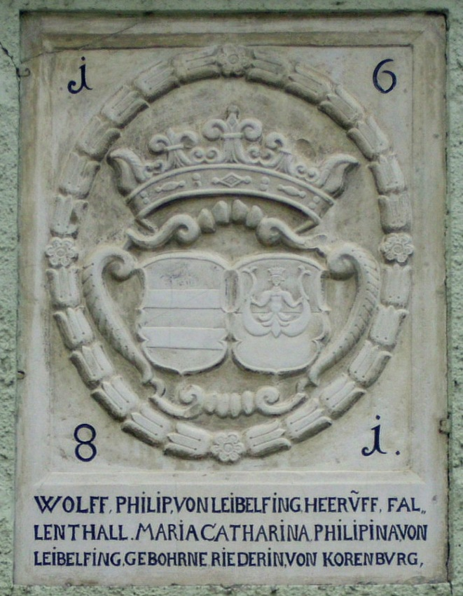 Falbenthal, Ortsteil der mittelfränkischen Stadt Treuchtlingen im Landkreis Weißenburg-Gunzenhausen (Bayern), Wappentafel von 1681 am ehemaligen Schloss